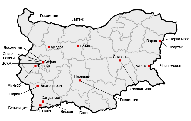 Карта на България показваща местоположението на футболните отбори за 2008/09 Map of Bulgaria showing A group 2008/09 football teams' locations